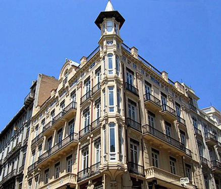 Casa Sancho, Valencia, Spain.